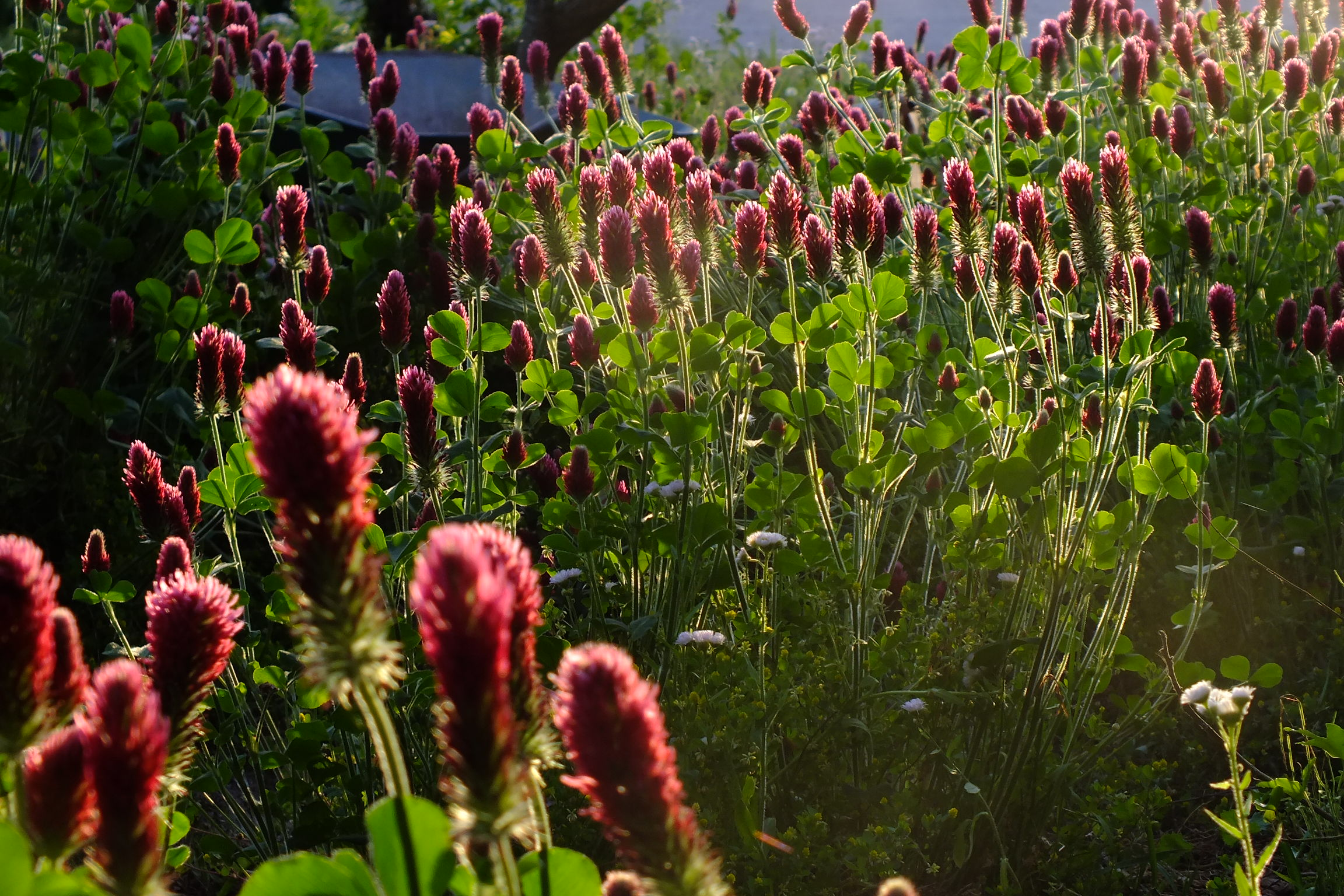 2015-05-05 Trifolium incarnatum(Strawberry candle) ベニバナツメクサ